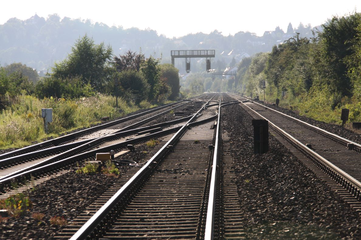 Hersbruck Ost West